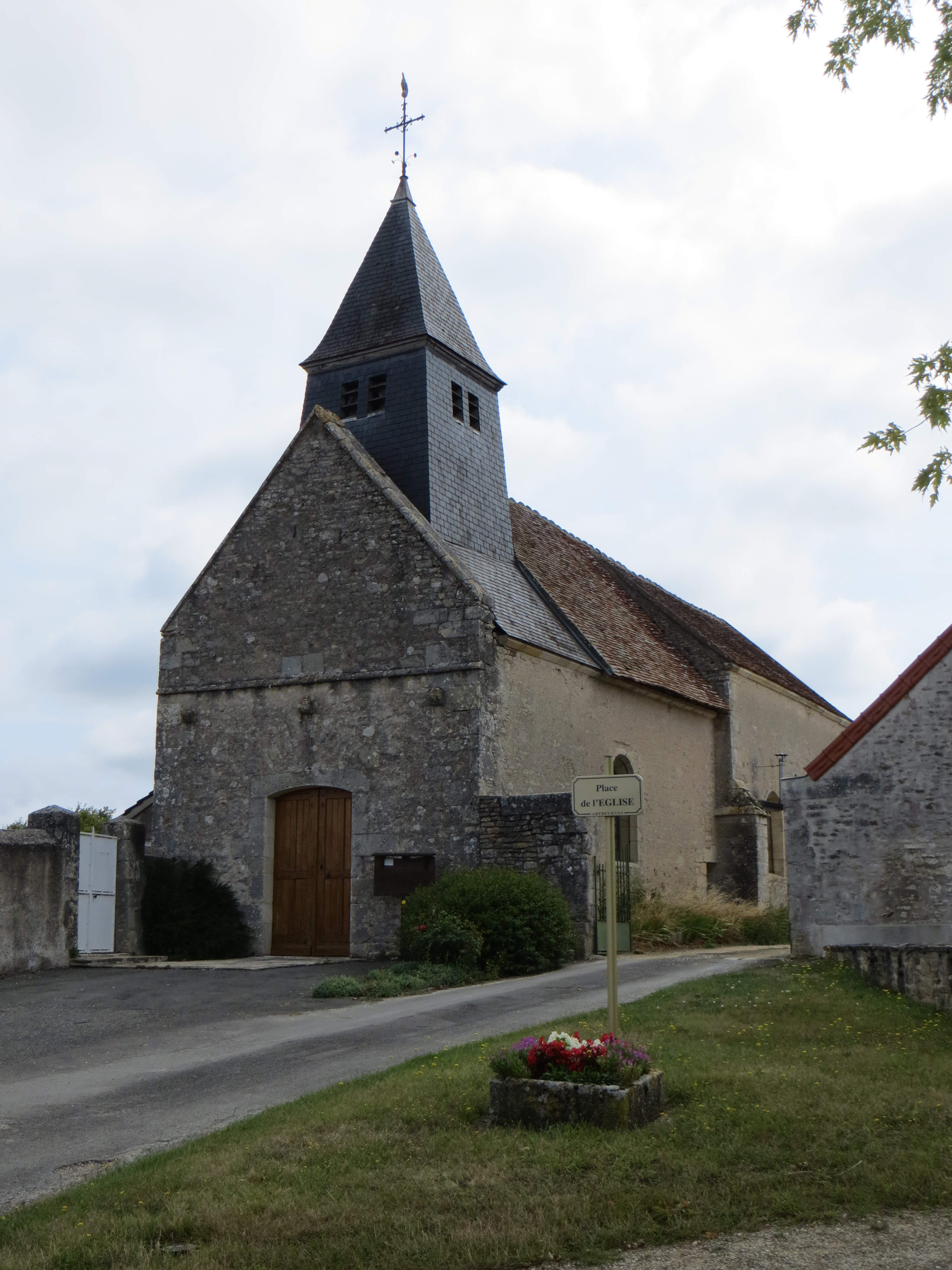 Vue générale de l'église